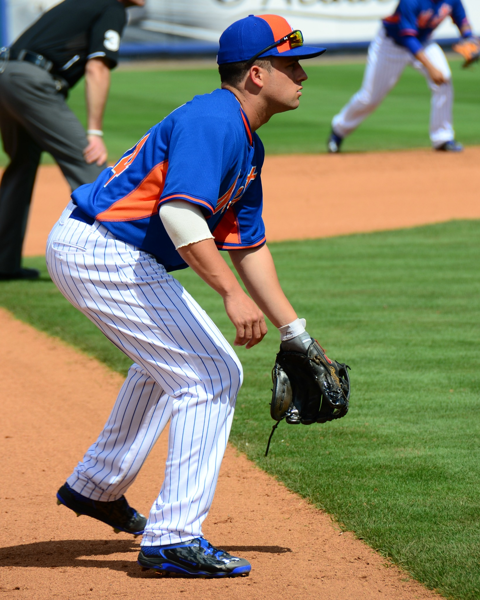 Daniel Muno